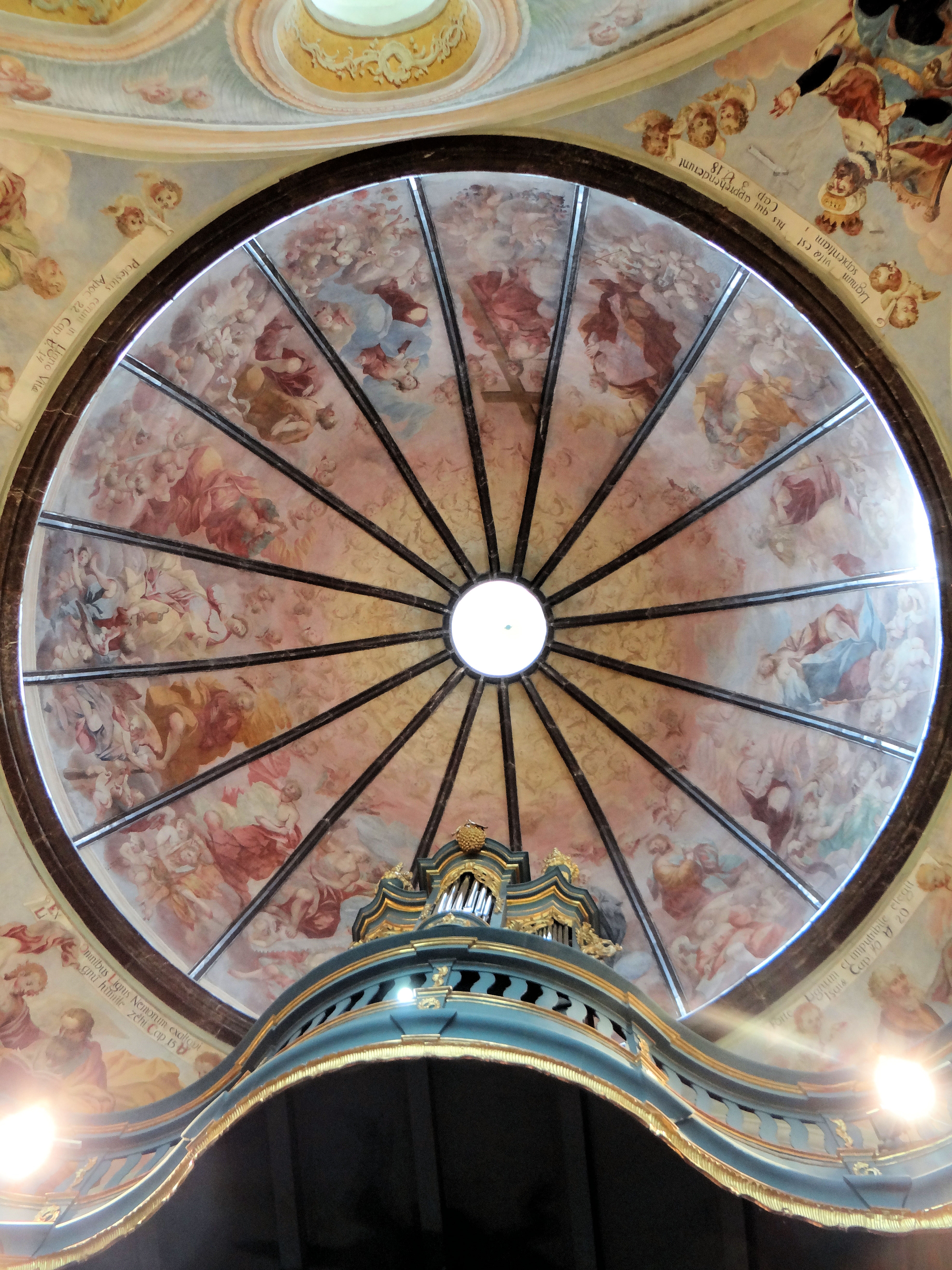 Kaplica Świętych Relikwii w Sanktuarium św Krzyża - organy i freski wokół nich